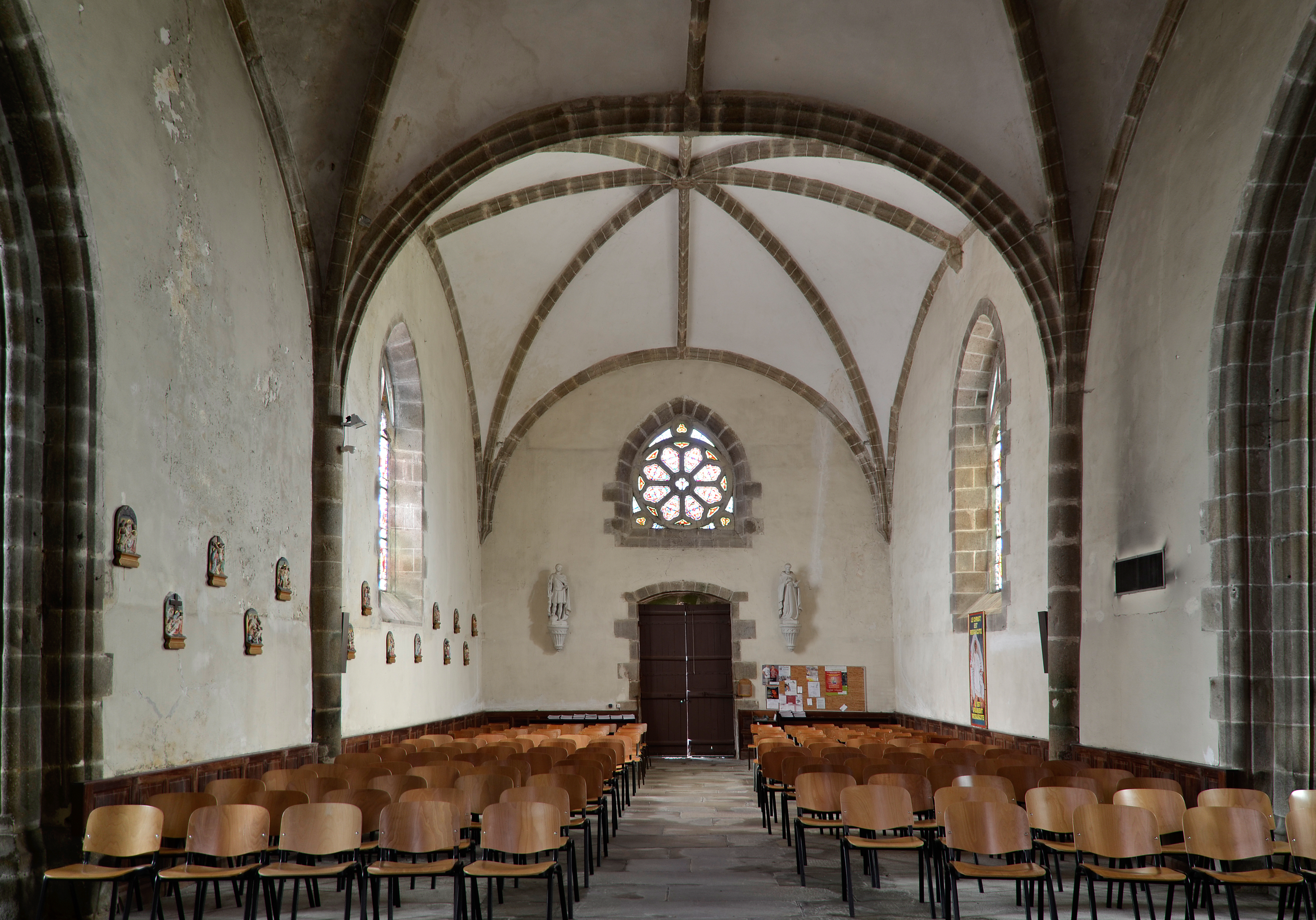 Église Saint-Jouin de Mauléon - Deux-Sèvres .